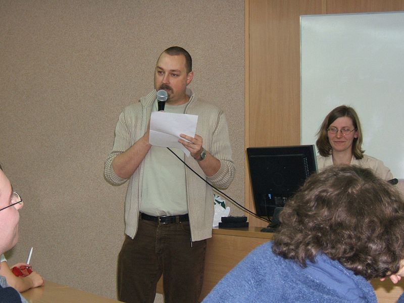 Aleksander Križ